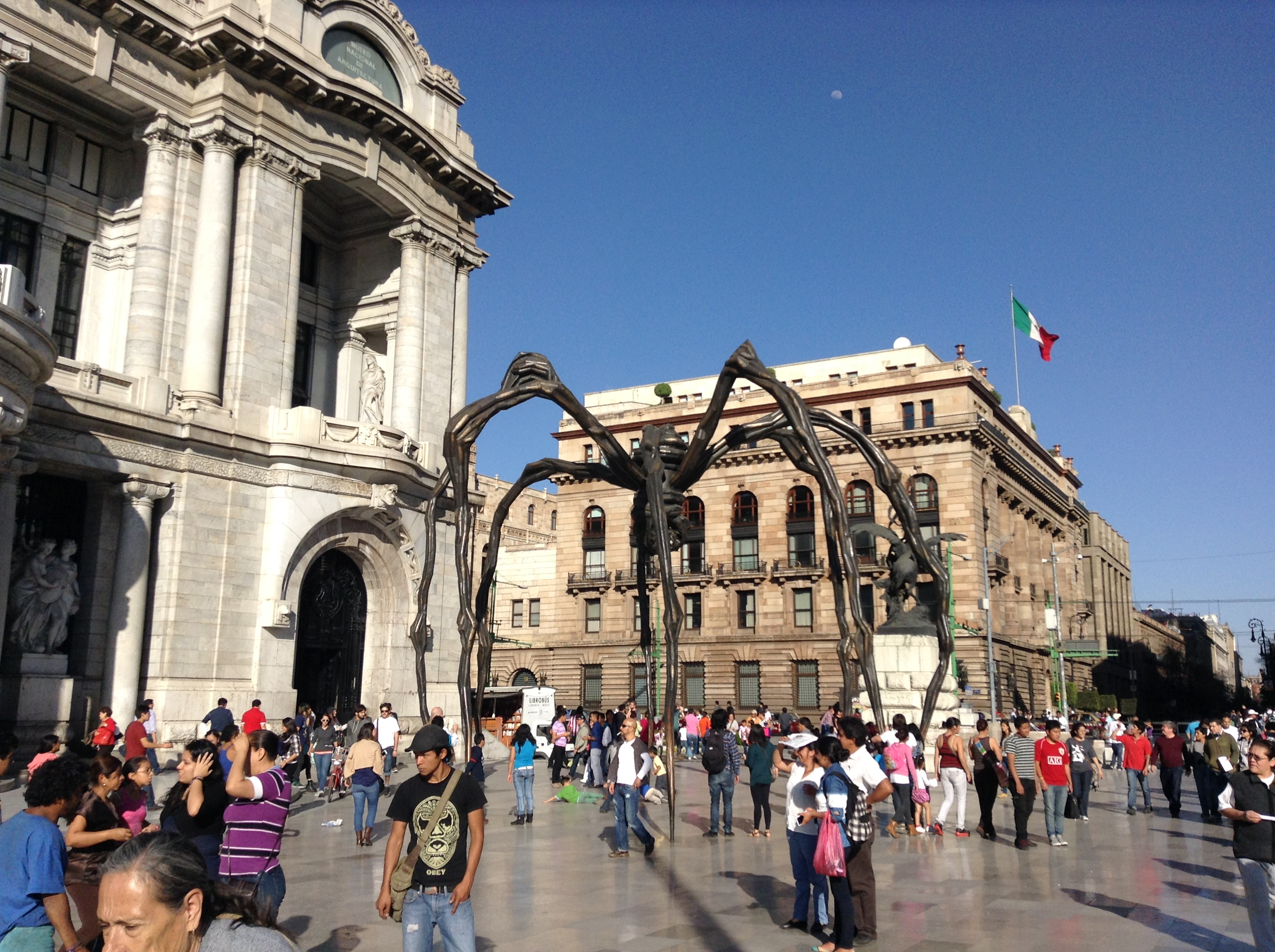 Palacio de correos, bellas artes